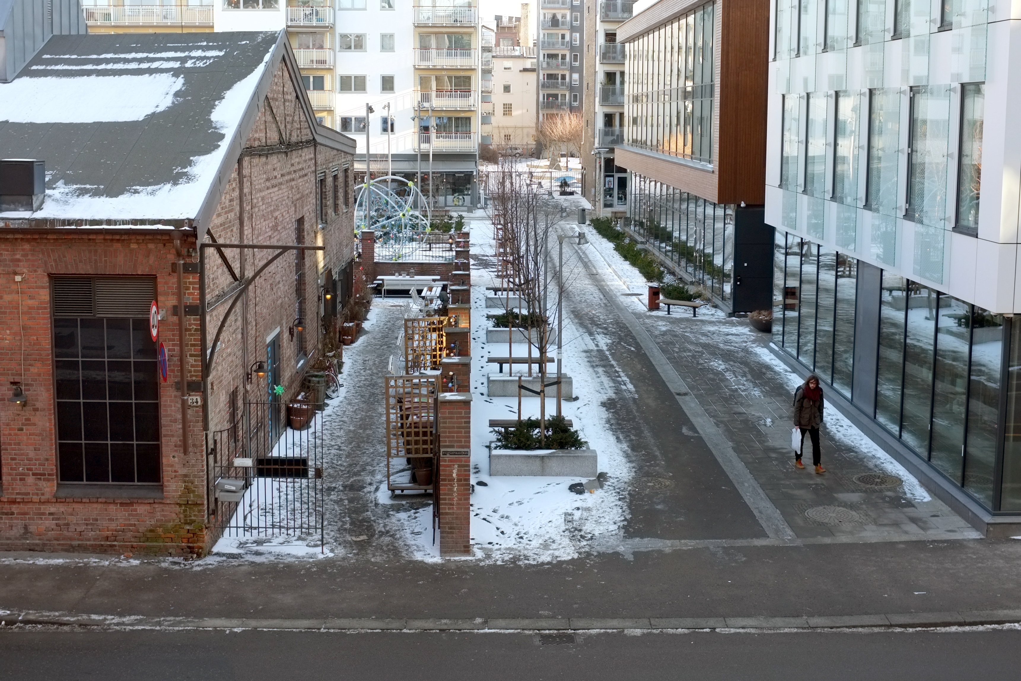 Joachim Nielsens gang. Grønland i Oslo.